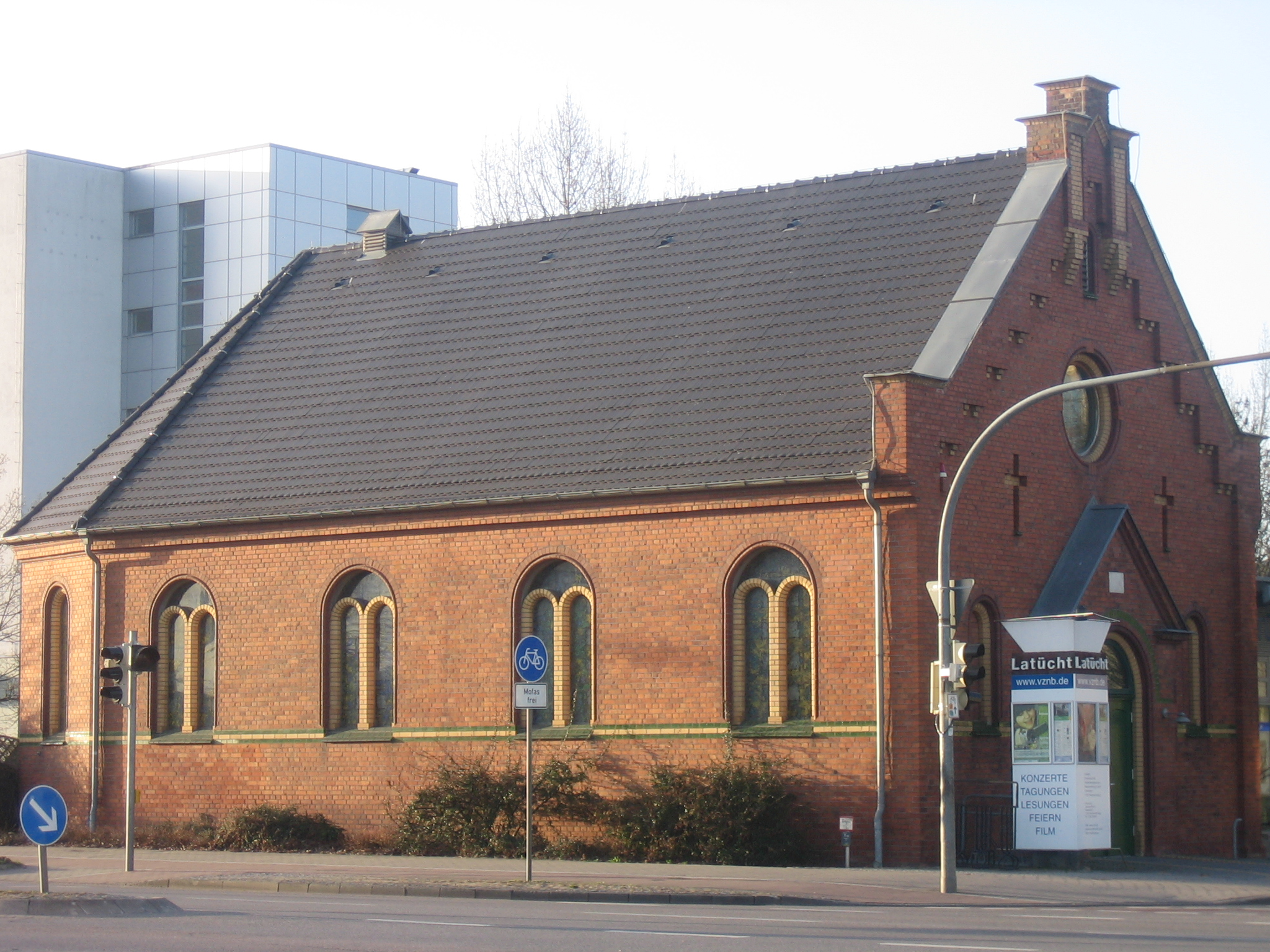 Veranstaltungszentrum Latücht, ehemalige katholische Kirche Sankt Joseph, Neubrandenburg, Mecklenburg-Vorpommern